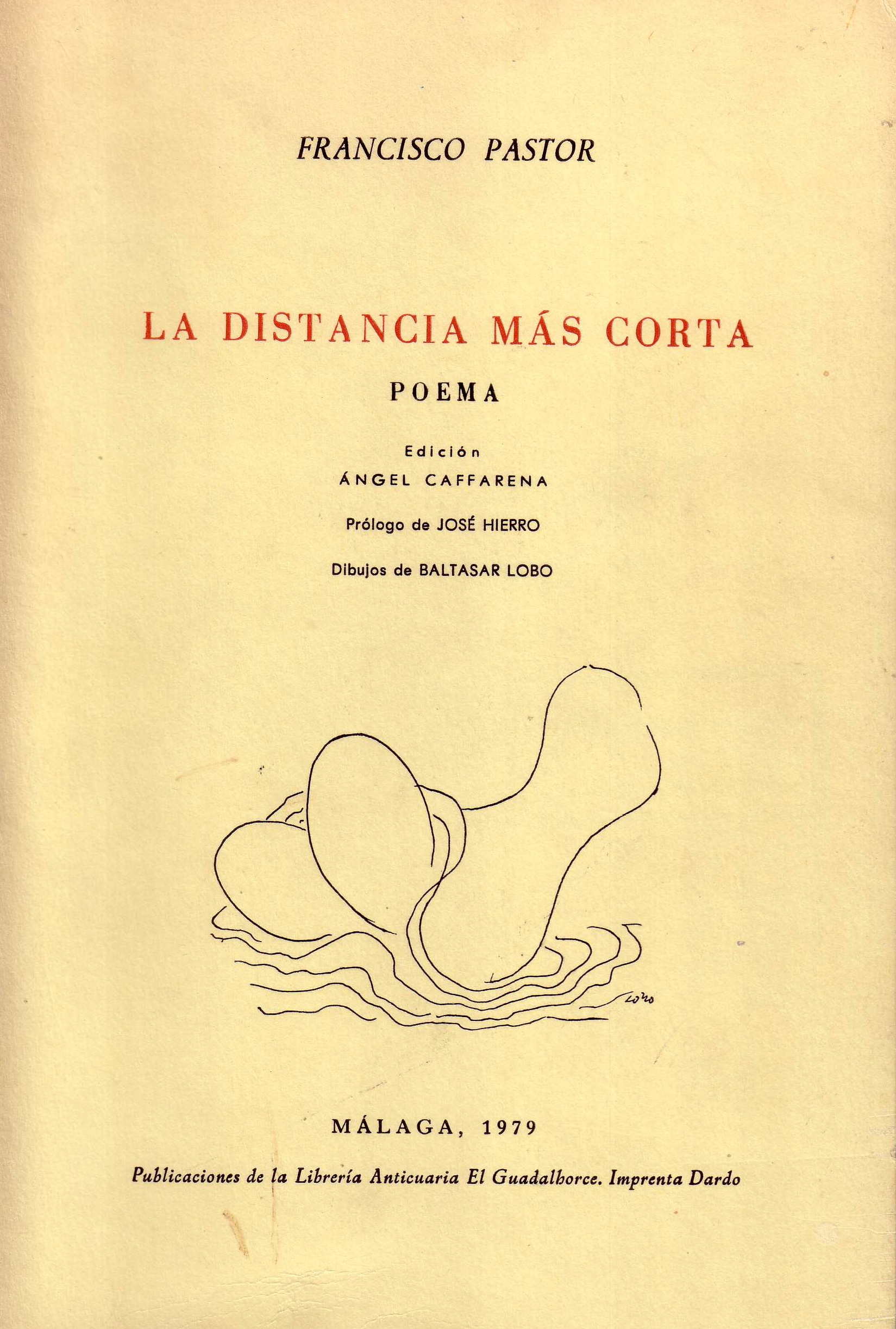 Portada de "La distacia más corta", de Francisco Pastor.